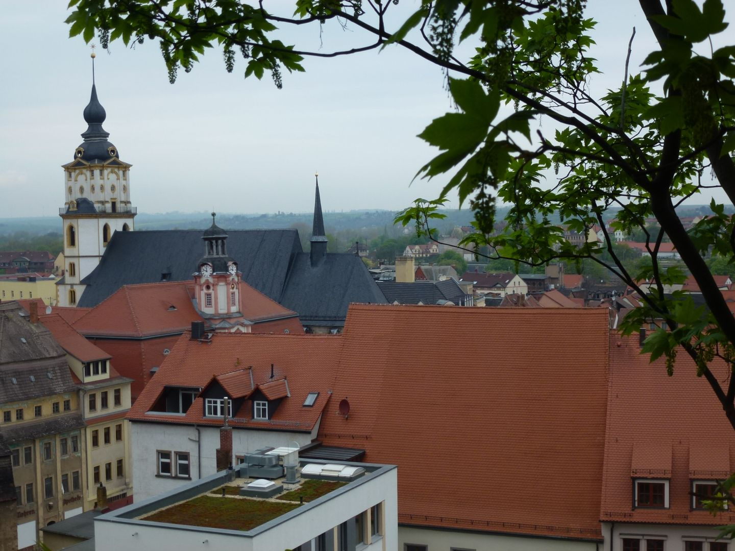 Blick vom Schloss Neu-Augustusburg auf die Weißenfelser Altstadt